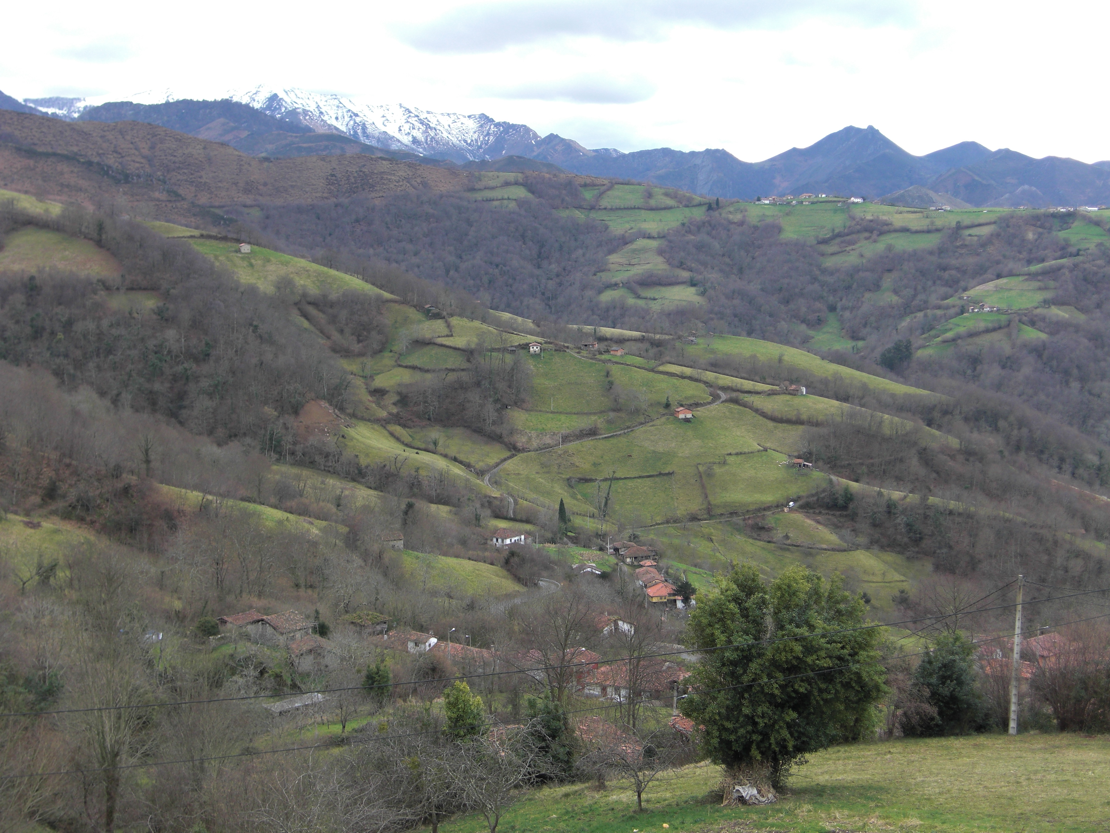 Foto de Llerandi